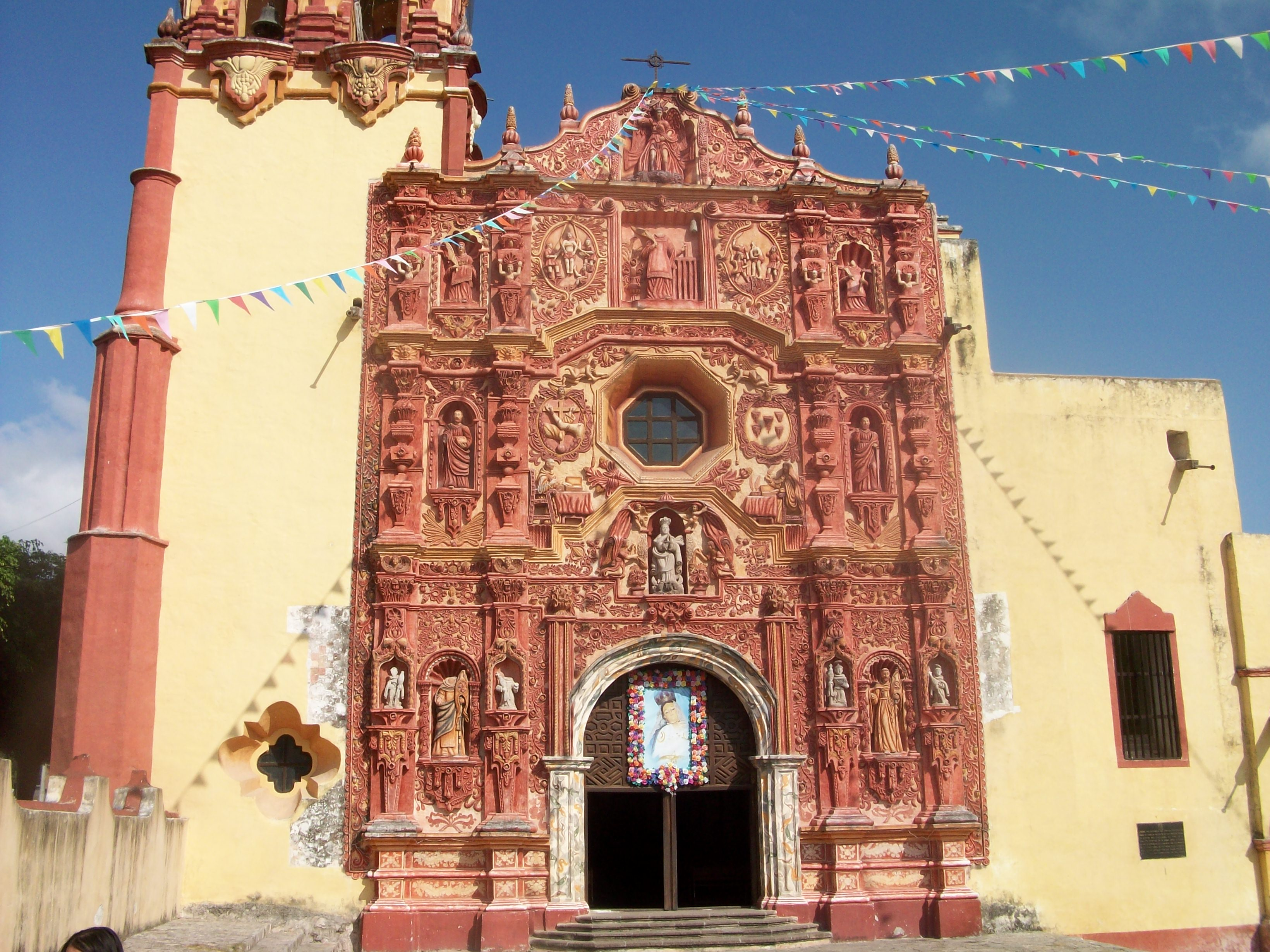 Misión de Landa de Matamoros